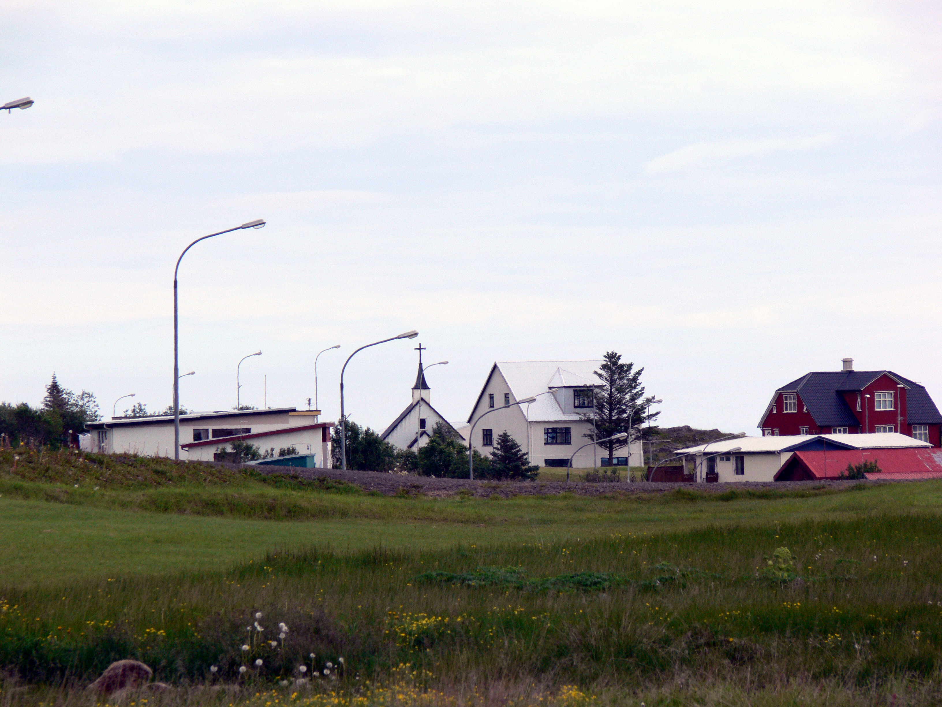 Djúpivogur. Im Hintergrund die alte Kirche.